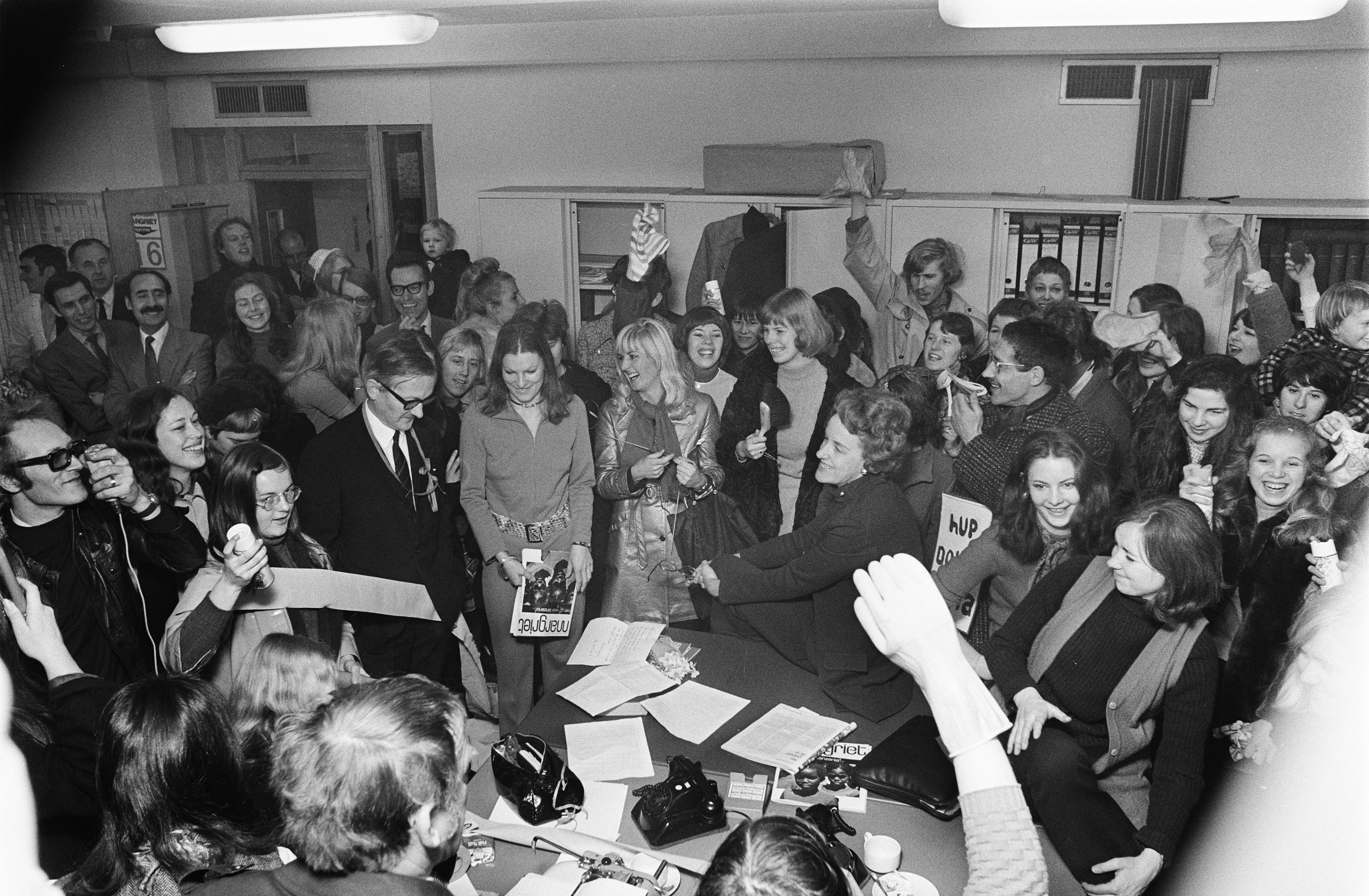 Aktiegroep "Dolle Mina" in redaktielokalen van damesblad Margriet Amsterdam. Dolle Mina's met stofdoeken en spuitbussen. De Dolle Mina's zijn in discussie met directeur Te Marvelde en adjunct hoofdredacteur mevrouw Van den Horst Datum 20 februari 1970